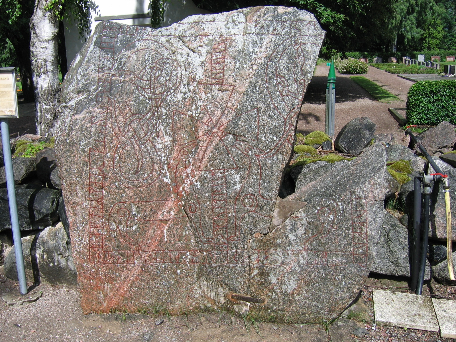 Runestone